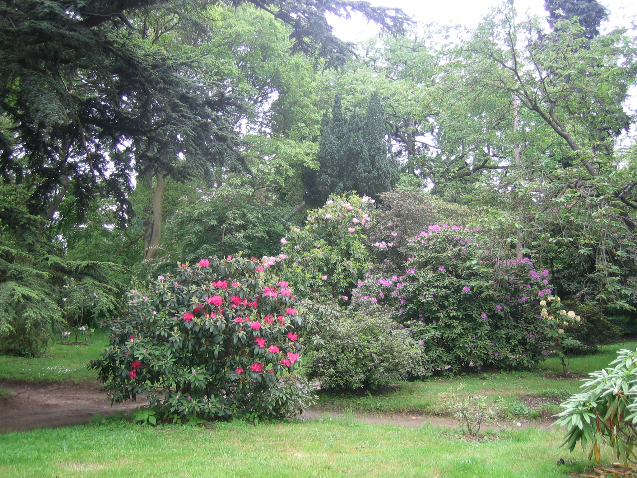 Cedrus brevifolia, Rhododendron